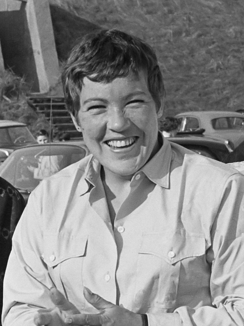 Start Tulpenrallye te Noordwijk, Pat Moss (rechts)en Jennifer Nadin aan de start 23 april 1963